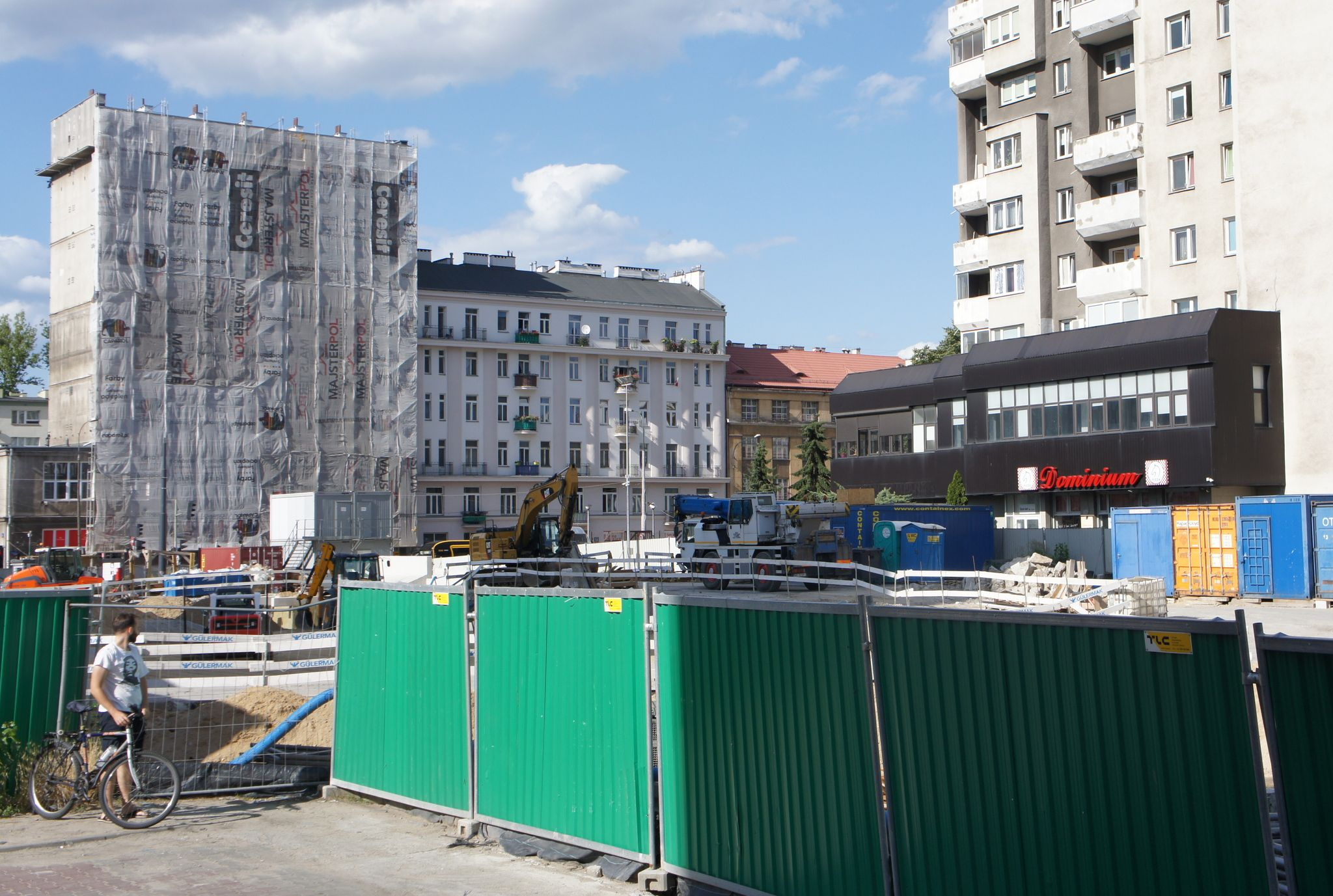 Budowa stacji metra "Płocka" w Warszawie.